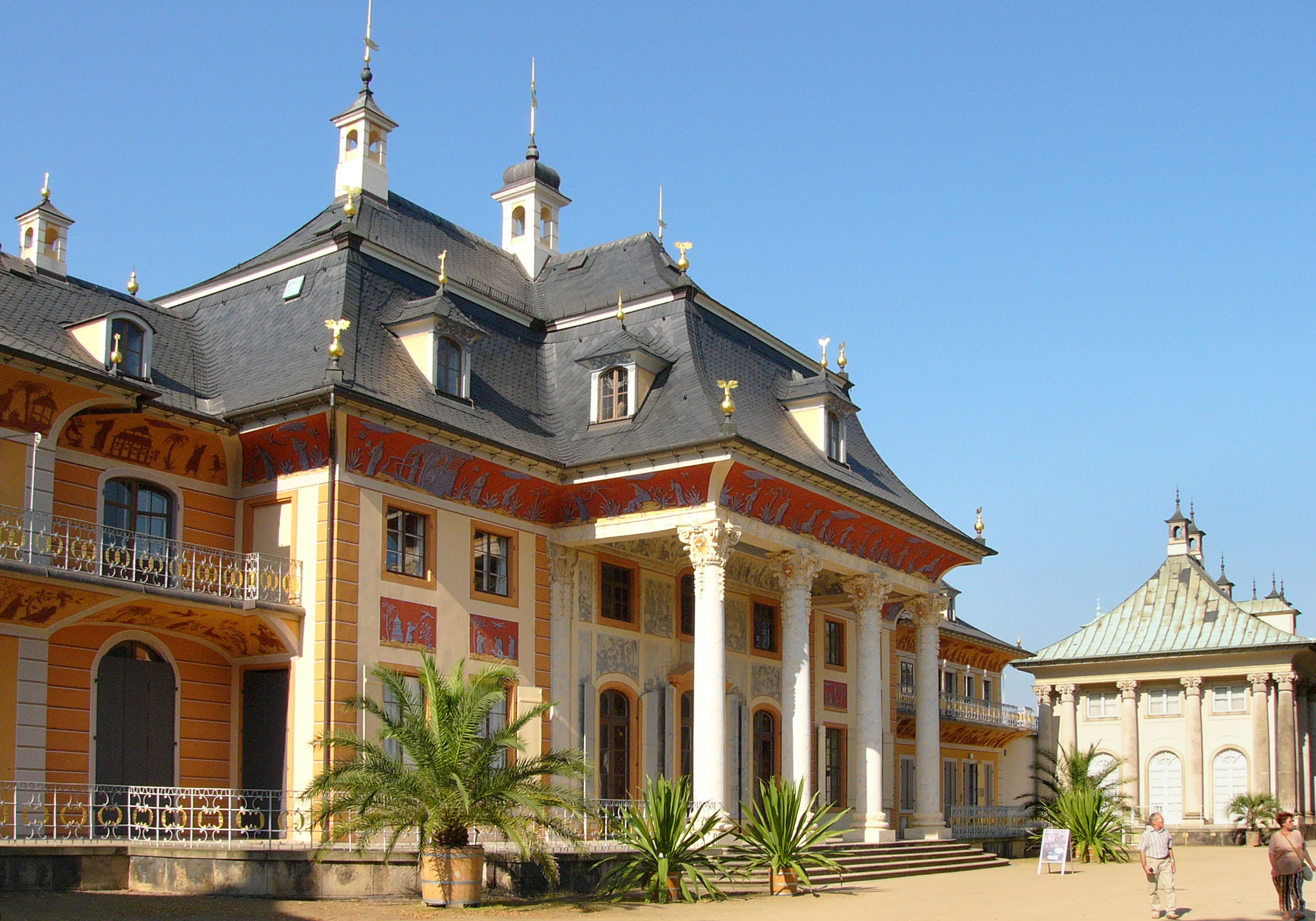 Pillnitz Castle near Dresden, Germany